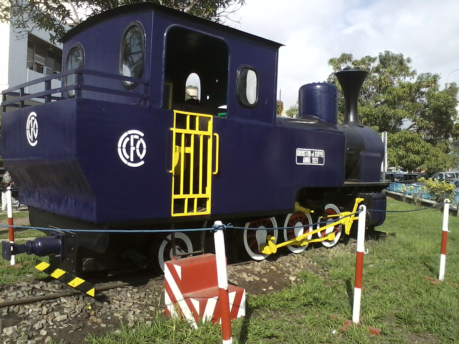 maquette d une vieille locomotive a vapeur de 1923 utilisee au cfco a sa construction This is an image with the theme "Africa on the Move or Transport" from: Congo